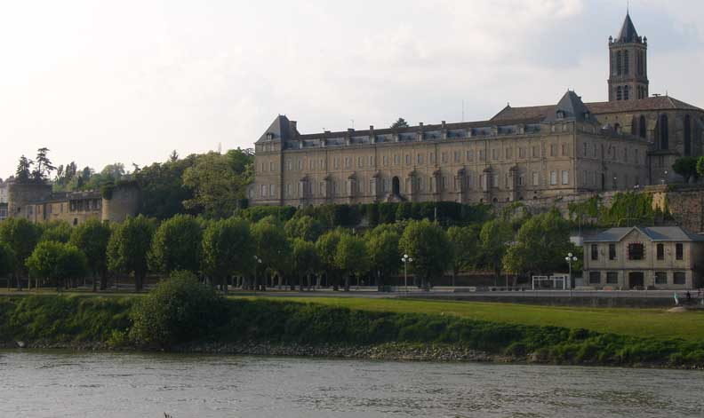 La Réole